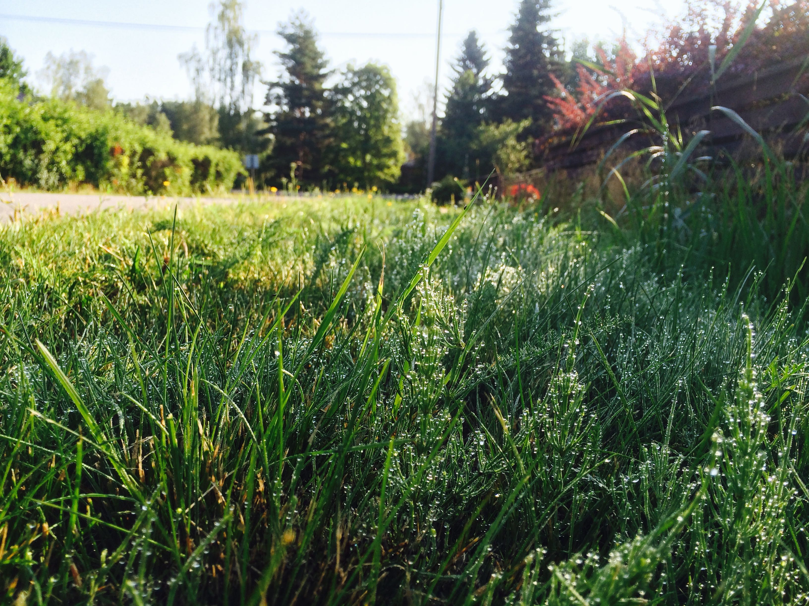 Empon omakotialue